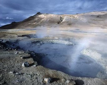 Врста хидрогеотермалне енергије(,гејзер), на Исланду.